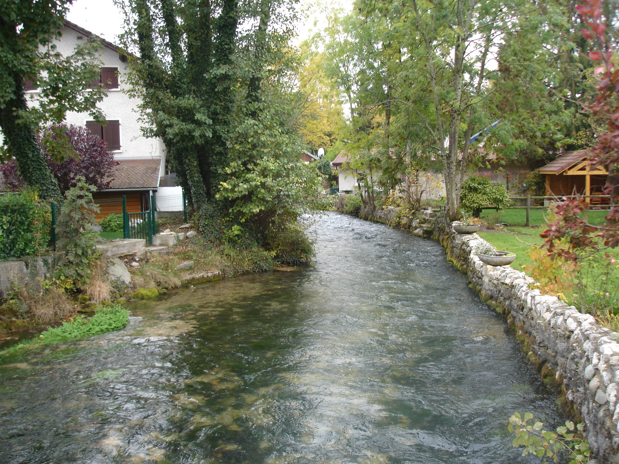 Rivière traversant le centre de Divonne-les-Bains